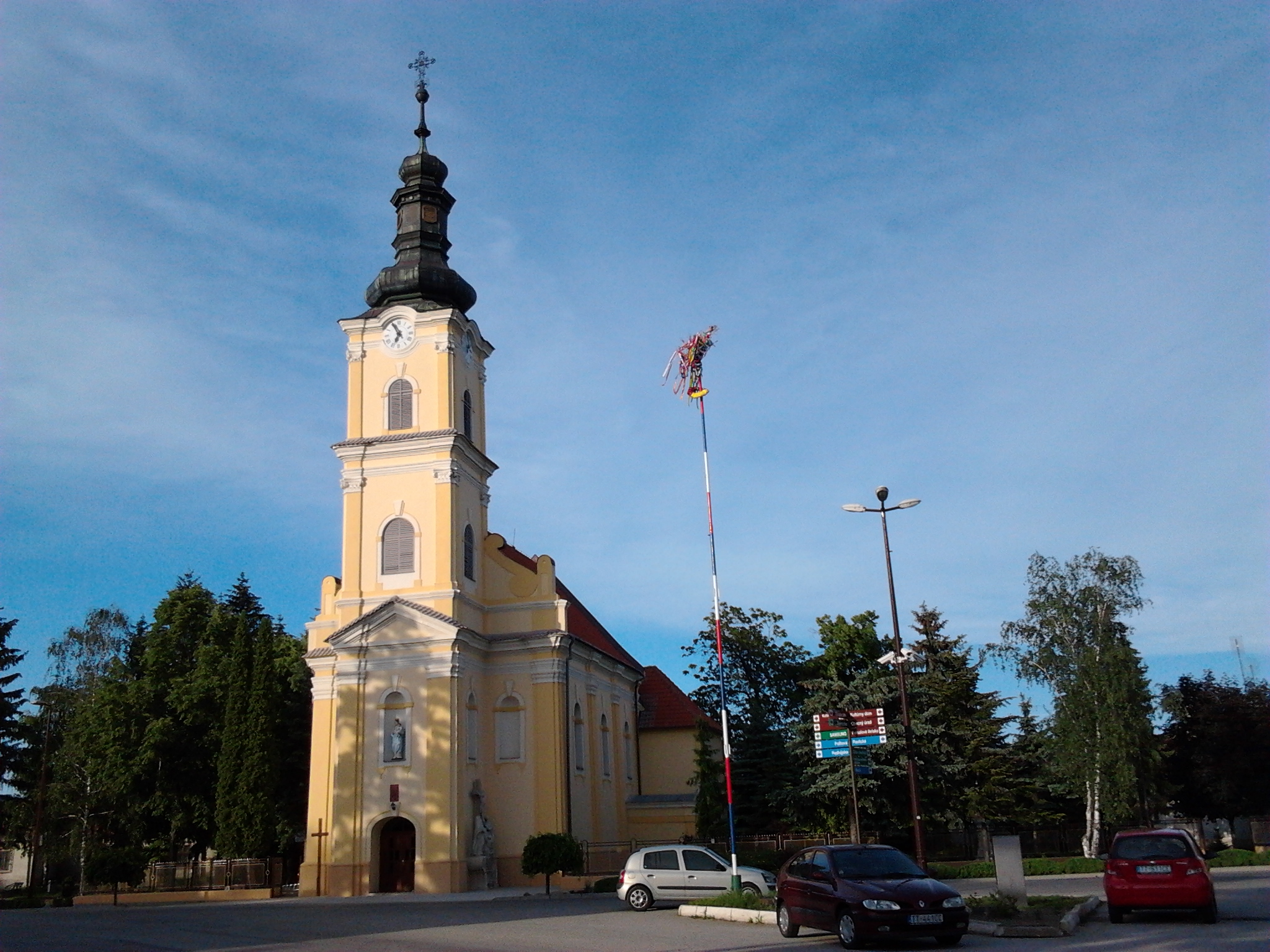 919 42 Voderady, Slovakia